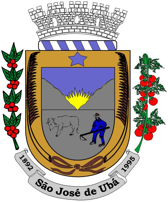 Brasão do Município de São José de Ubá.